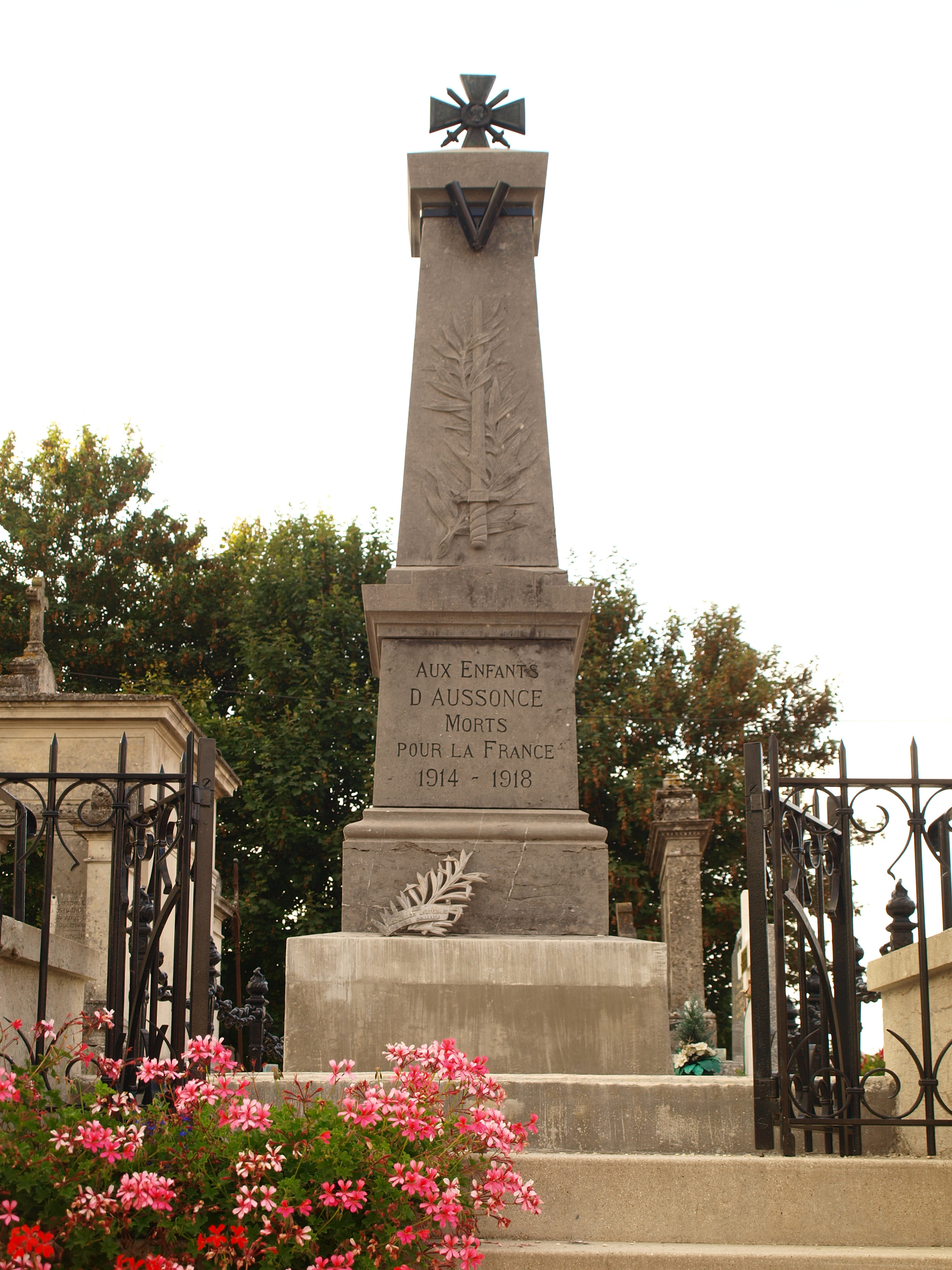 Aussonce (Ardennes, France) ; monument aux morts